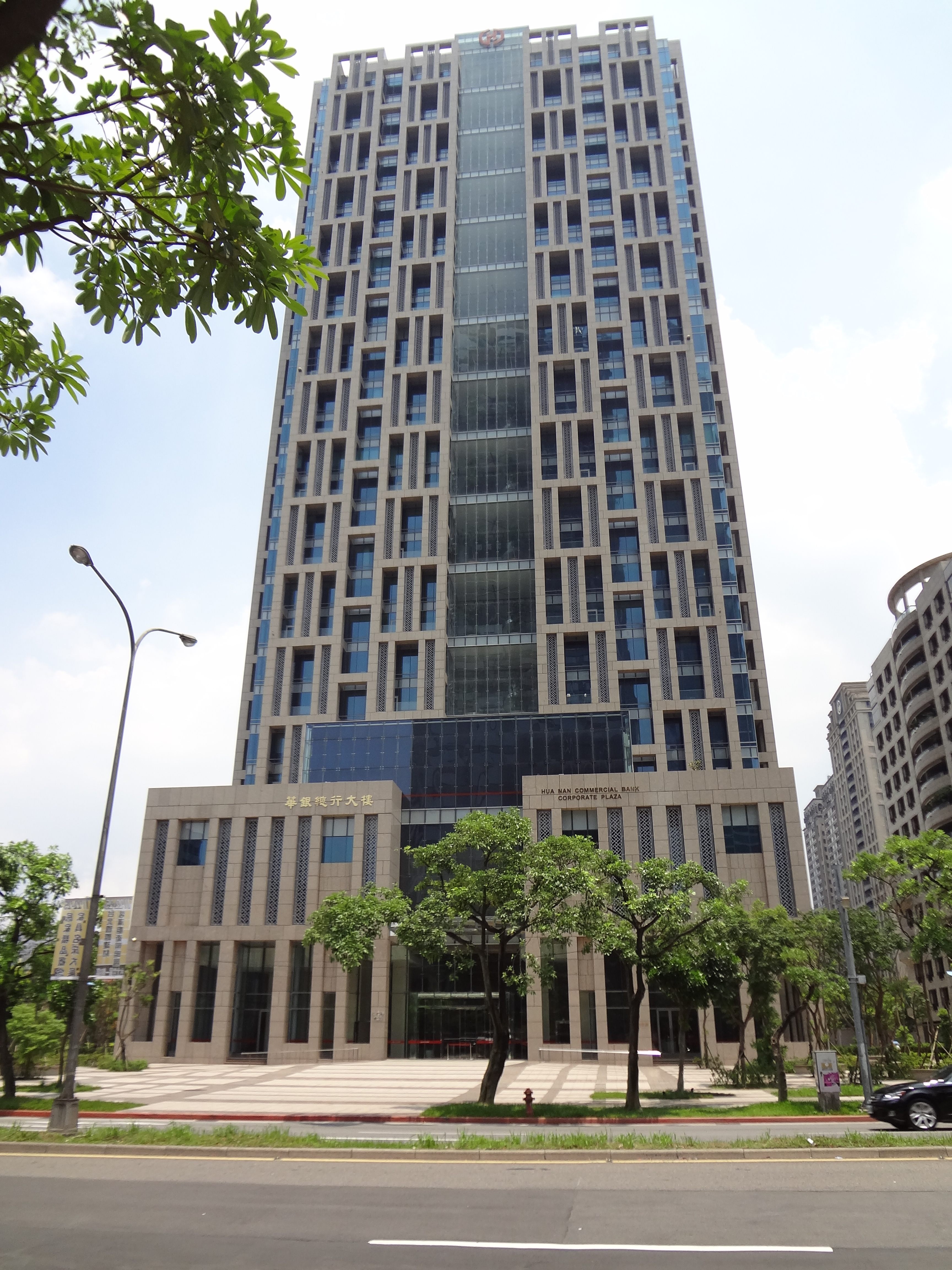 華銀總行大樓，為華南金融控股公司總部與華南商業銀行總行所在地，位於臺北市信義區松仁路123號。